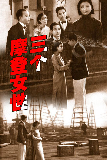 《三个摩登女性》海报